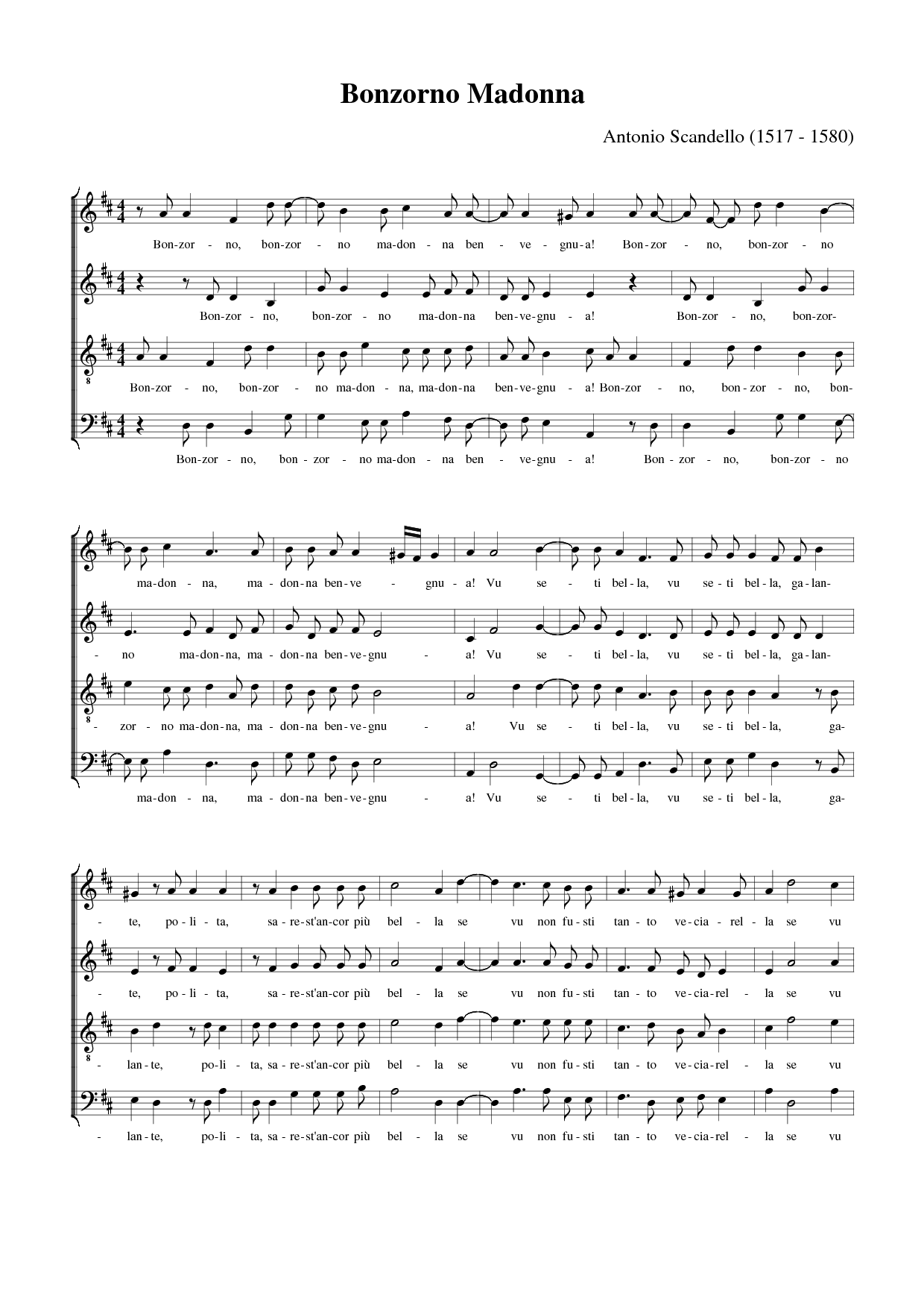 Partition de Bonzorno Madonna, quatre voix, chant d'origine napolitaine